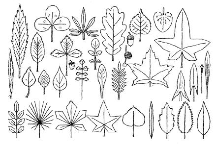 وحدات زخرفية نباتية مستوحاة من الطبيعة